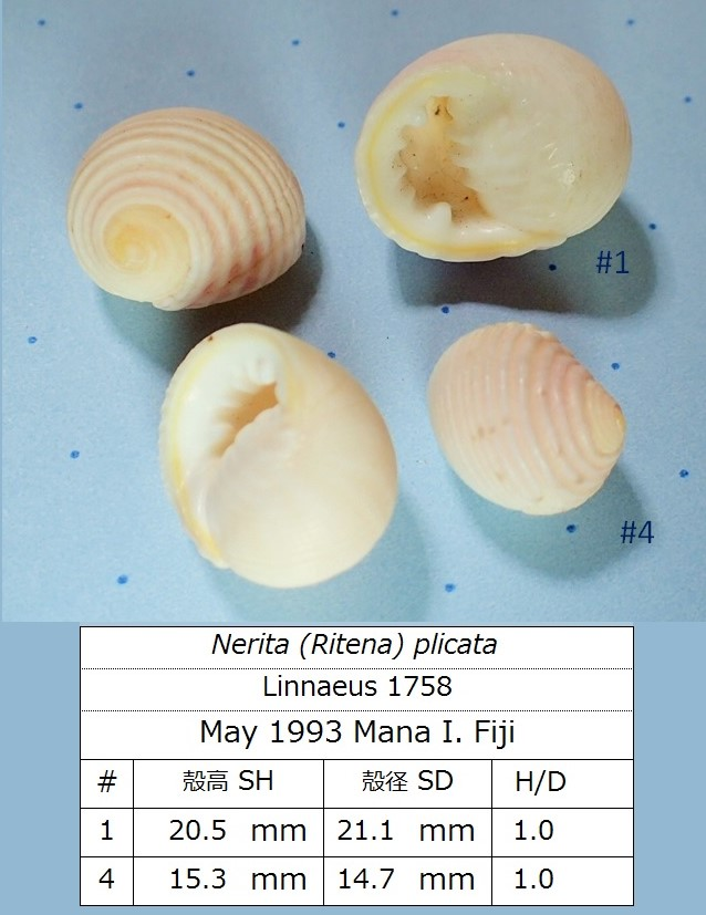 マナ島のビーチでひろったキバアマガイ。多数落ちていた。